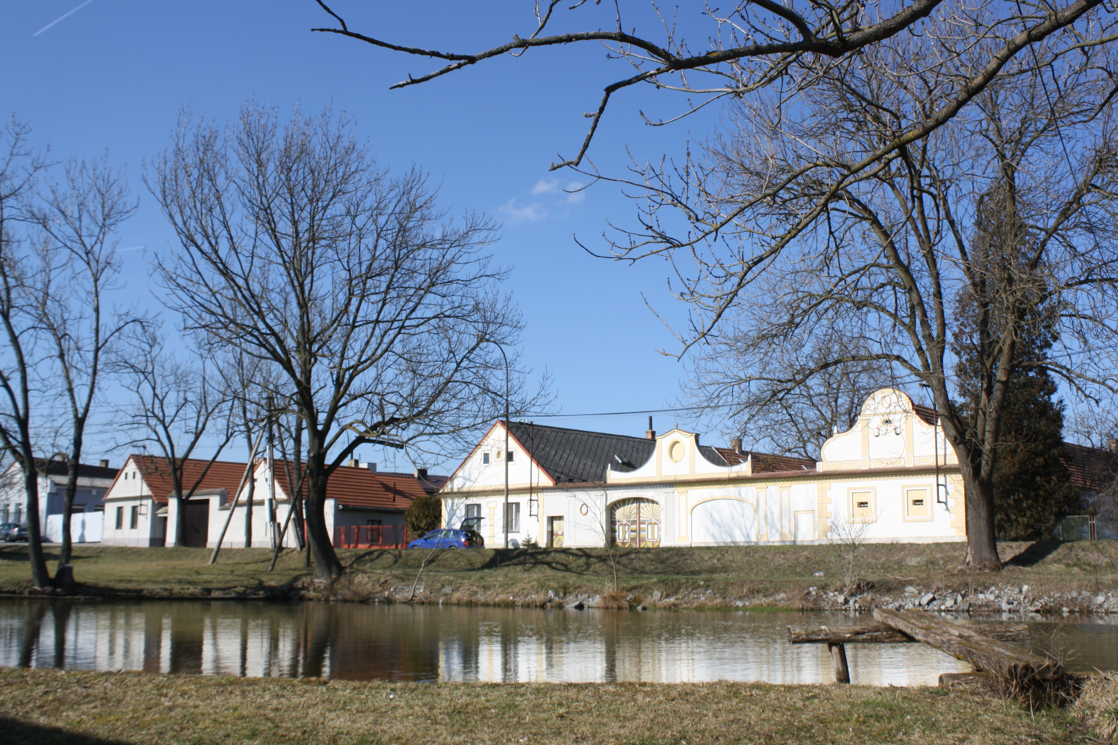 Kolný (okres České Budějovice)